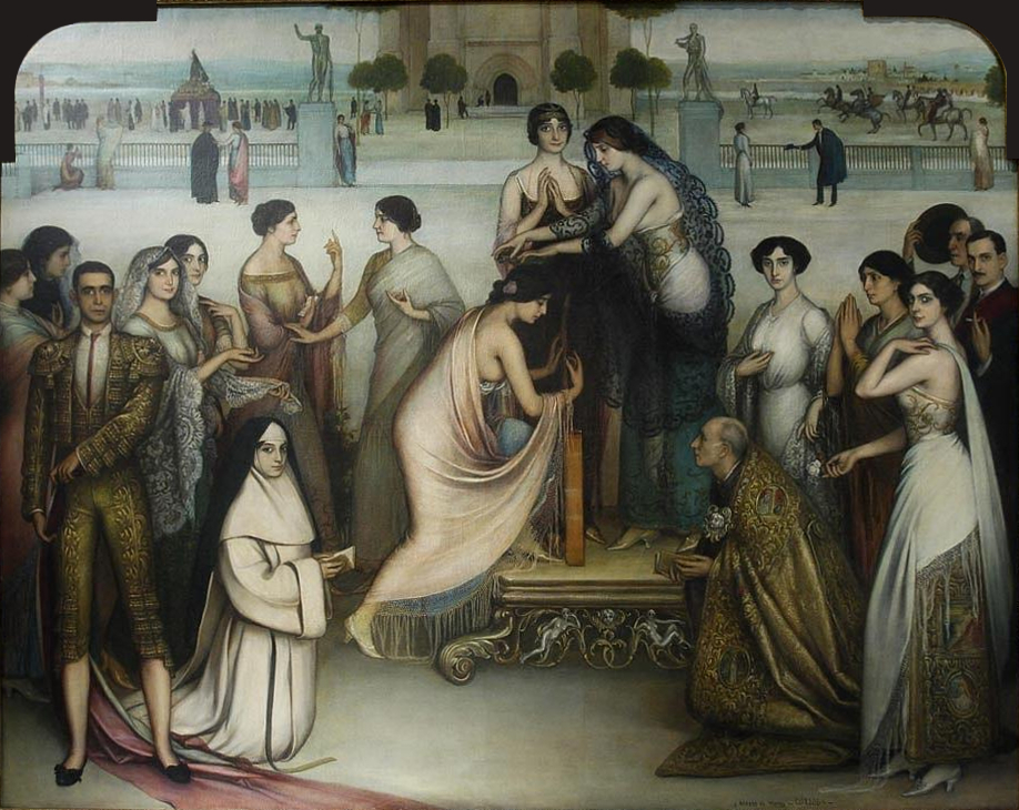 La Consagración de la Copla. 1912. Óleo y temple sobre lienzo. 228 x 285 cm.